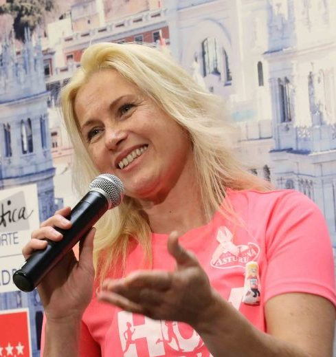 La delegada del Área de Políticas de Género y Diversidad, Celia Mayer, y el director de publicaciones de Motorpress, Fran Chico, han presentado hoy viernes 28 de abril, en el Palacio de Cibeles la decimocuarta edición de la Carrera de la Mujer que se celebrará el próximo 7 de mayo. Junto a todo ello, se entregaron los tradicionales premios a personas relevantes de apoyo a la mujer y al deporte: Carlota Serrano, subcampeona de España de 400 m vallas que ha derrotado el cáncer de mama en 2016; Gema Hassen-Bey, medallista paraolímpica en Barcelona 92 que está preparando su nuevo reto, Cumbre Bey – Kilimanjaro Challenge para llegar a ser la primera mujer en silla de ruedas que culmine la cima del Monte Kilimanjaro; y Emilio Monteagudo, jefe de Subinspección de Tráfico del Ayuntamiento de Madrid.